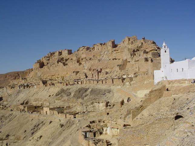 photographie personnelle